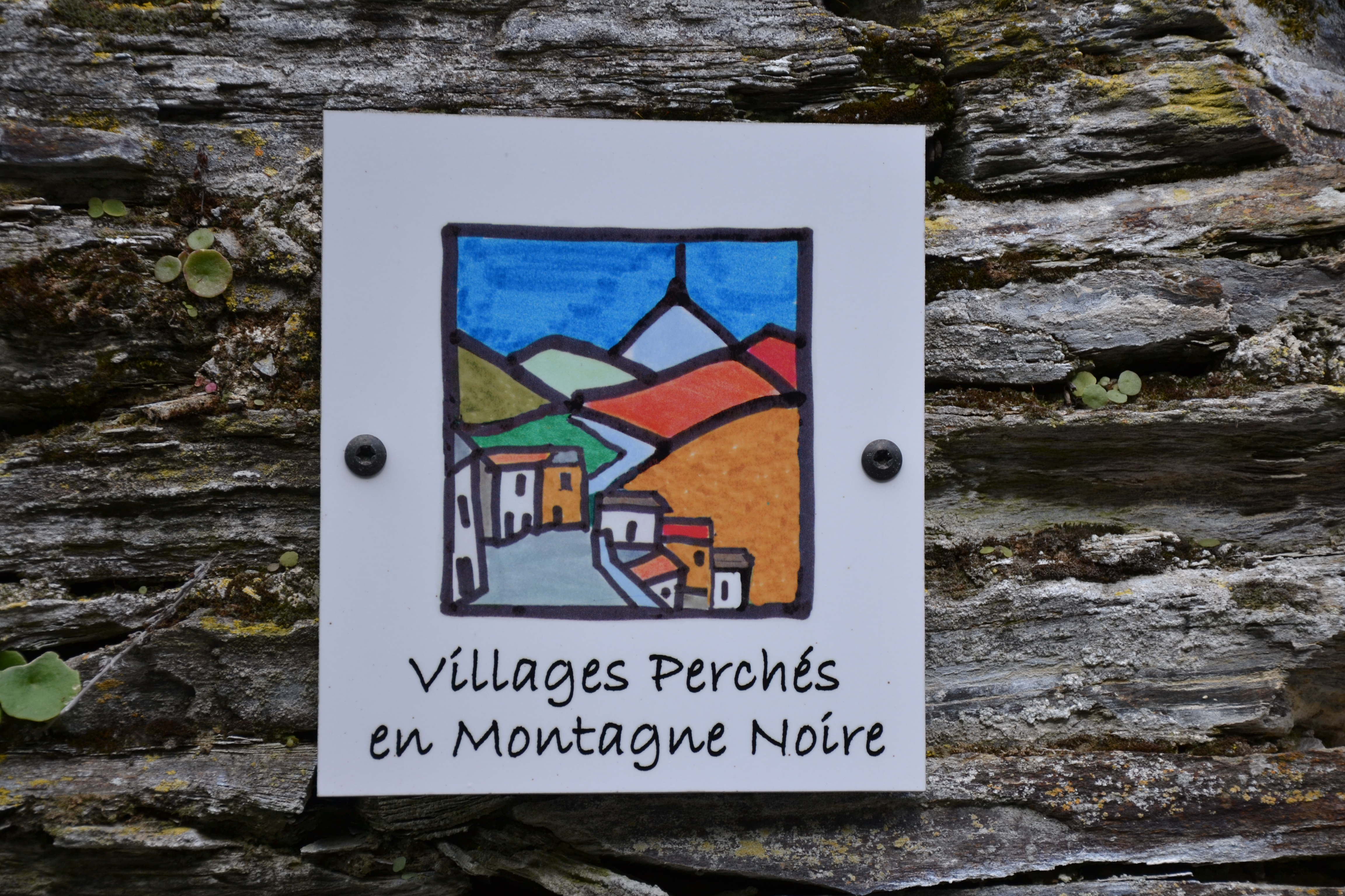 Affiche murale à La Tourette-Cabardès, département de l'Aude, France